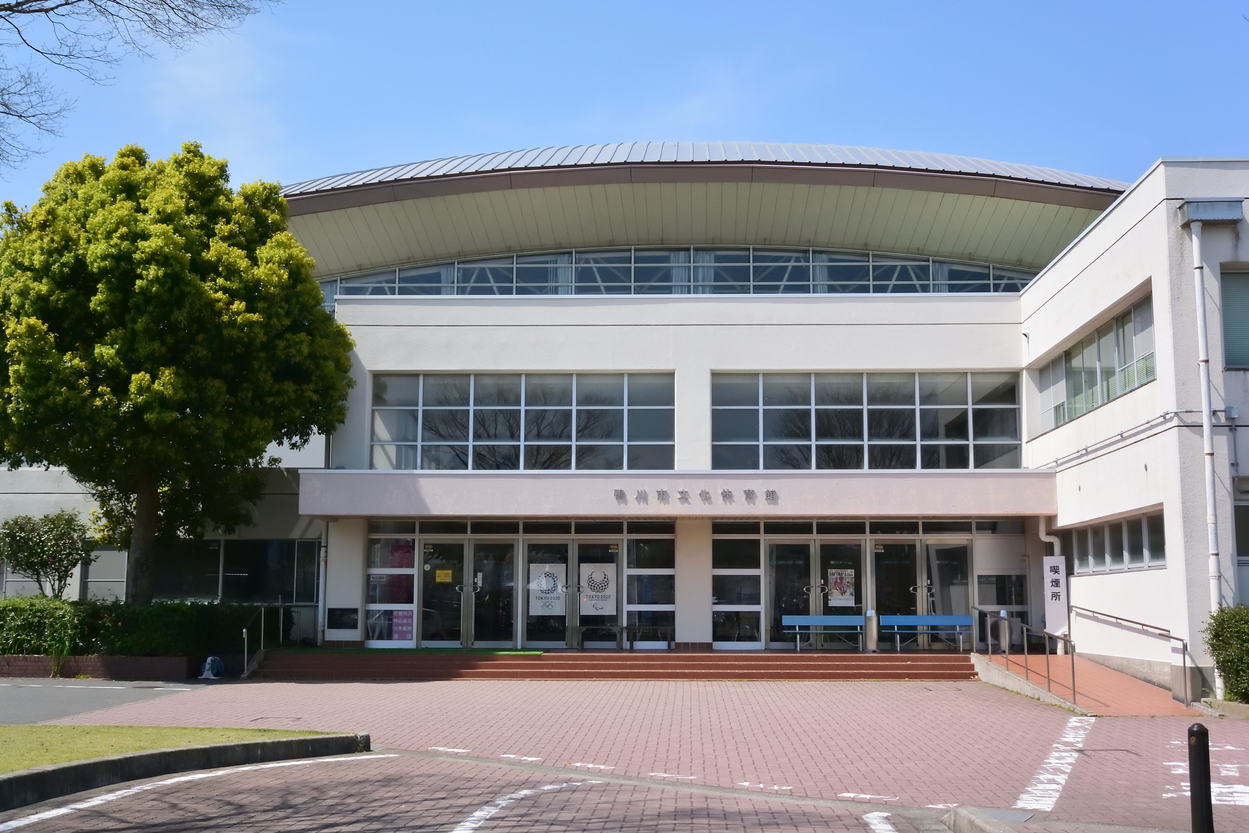 鴨川市文化体育館